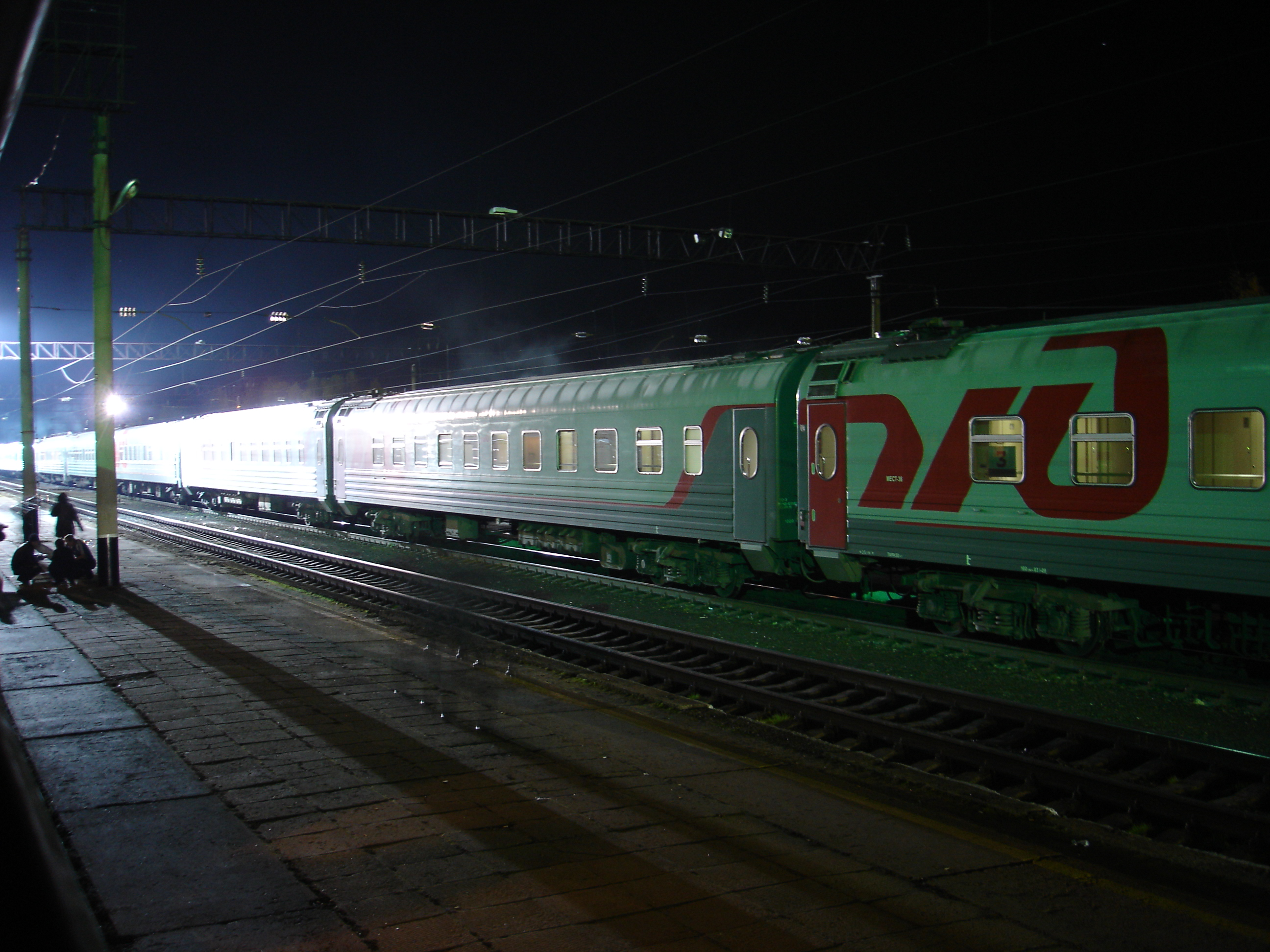 Купейный вагон РЖД, предположительно модель 61-4440 производства Тверского вагоностроительного завода.